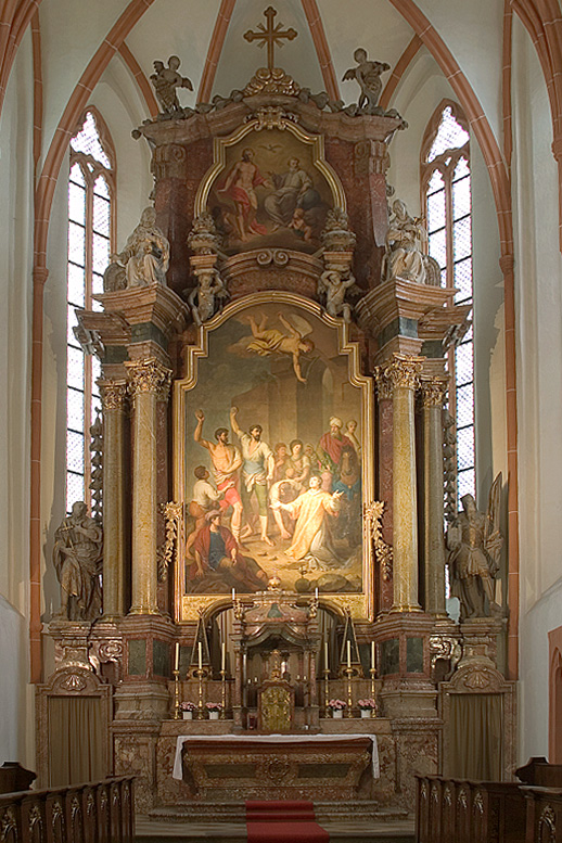 Hochaltar in der Pfarrkirche St. Stephan, Tulln